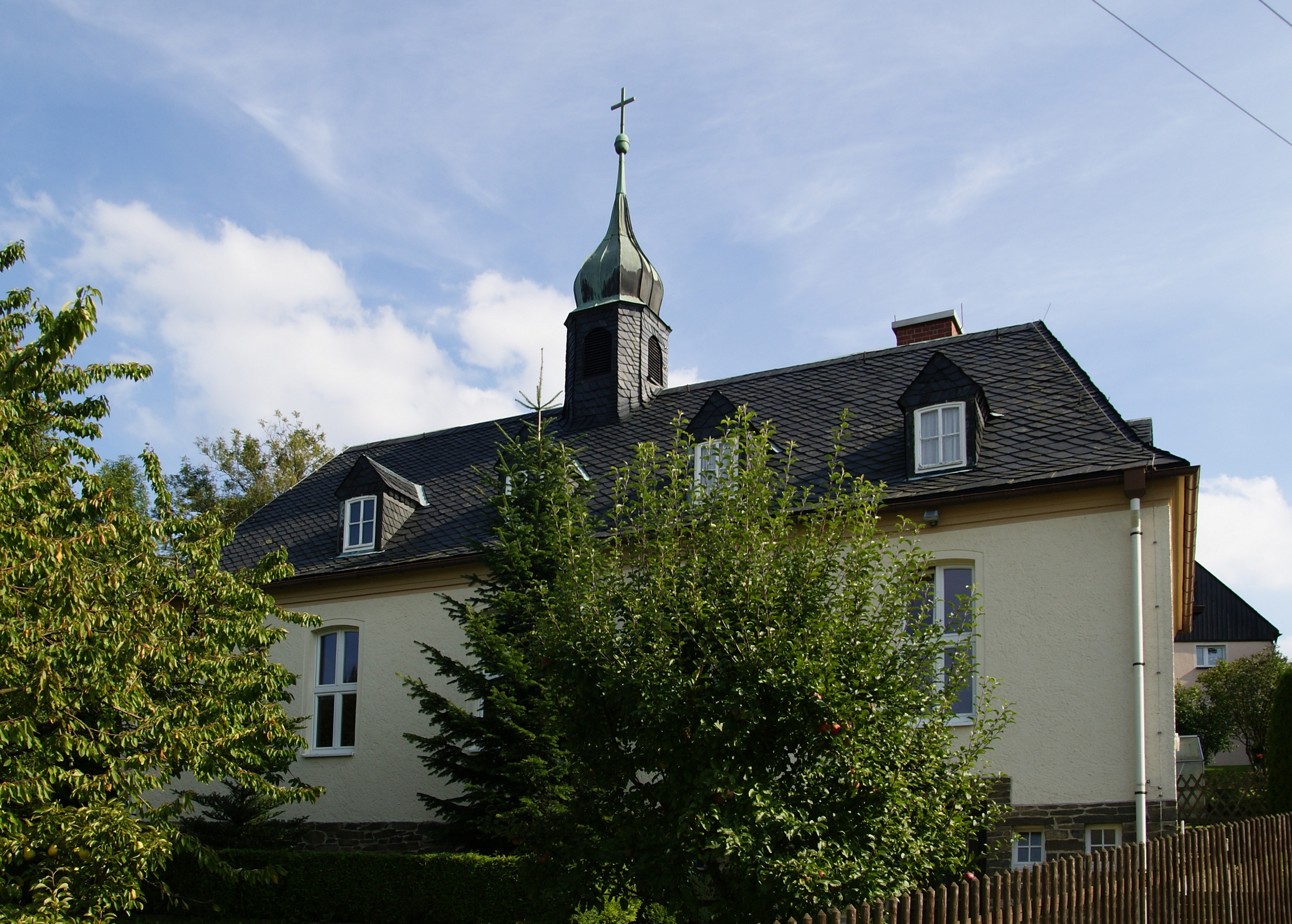 Kapelle Hohndorf